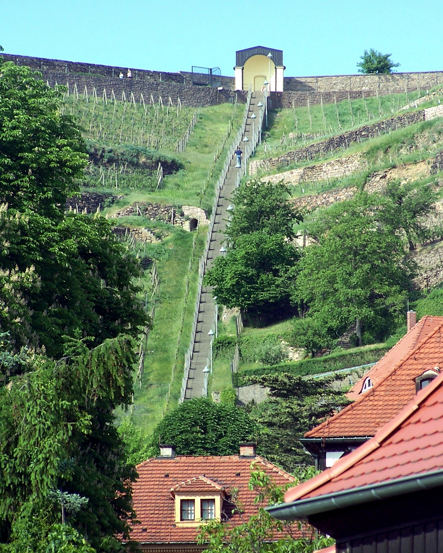 Spitzhaustreppe in Radebeul, Landkreis Meißen